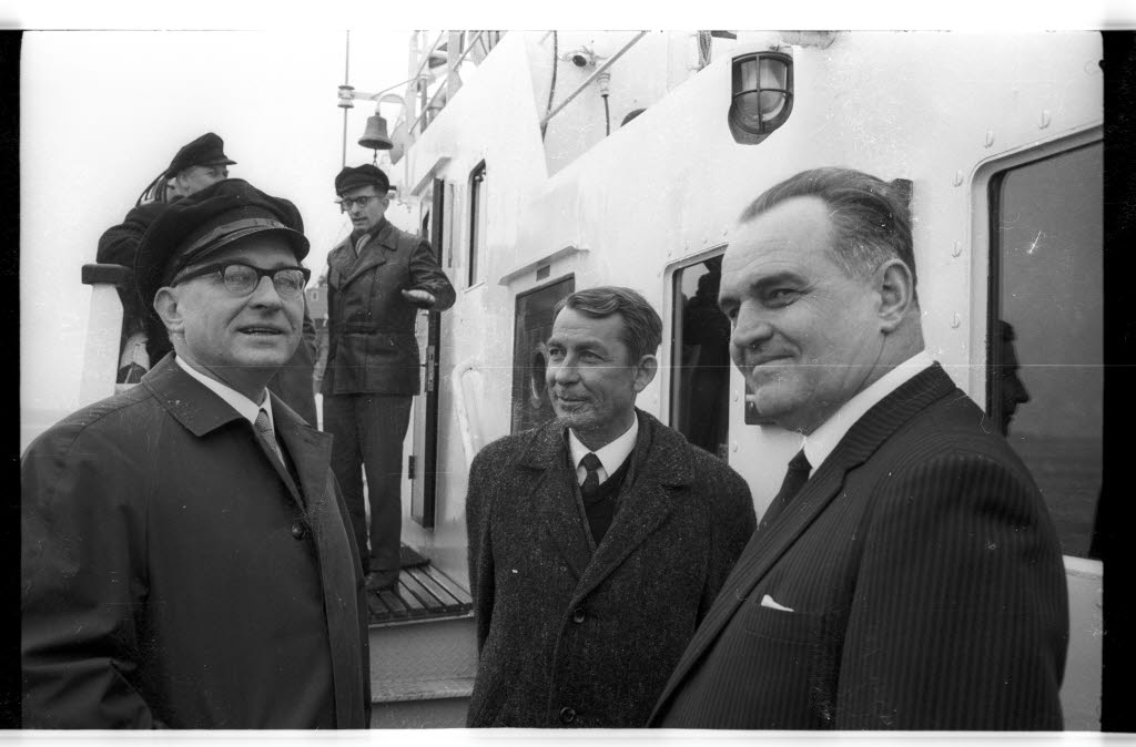 Im Bild der Direktor vom Institut für Meereskunde Prof. Dr. Günter Dietrich (links), der Landeskultusminister Claus Joachim von Heydebreck (Bildmitte) und Kapitän Ohl.